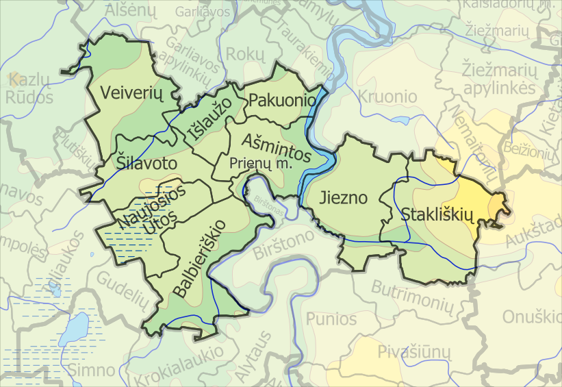 Padaryta iš :image:LietuvosSeniunijos.png